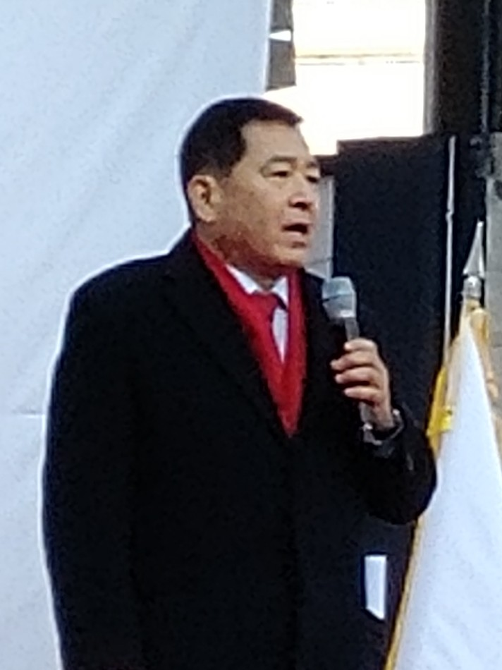 문재인 정권 규탄대회에서 연설을 하는 심재철 자유한국당 원내대표